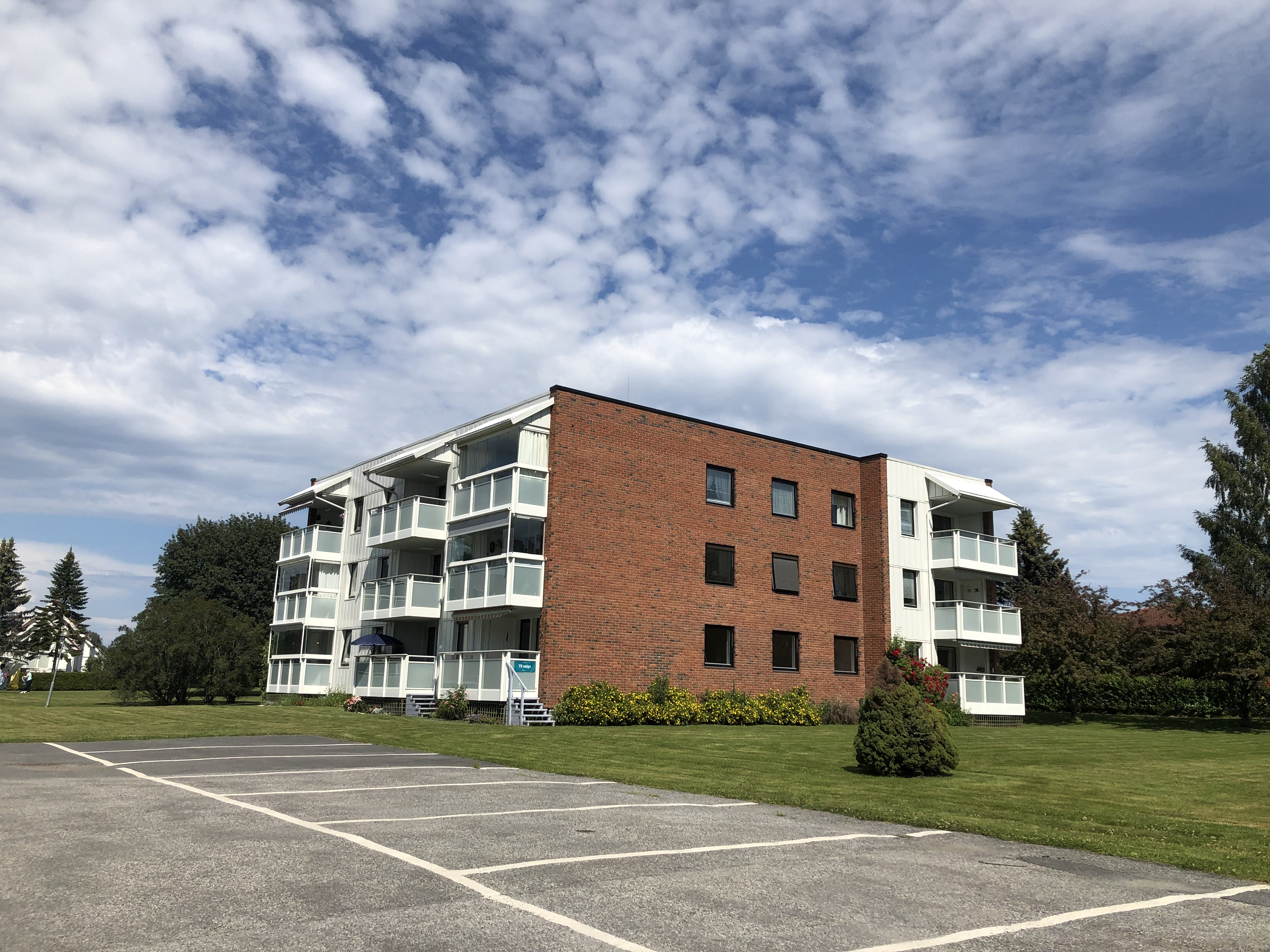 Lavblokk, Eikliveien 40, Hønefoss.